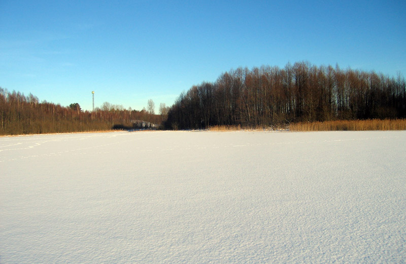 Kauknorėlis